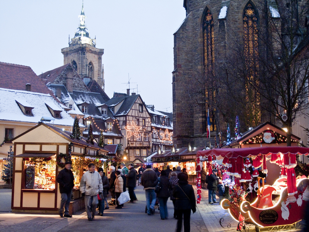 Colmar - Christmas Markets 2010